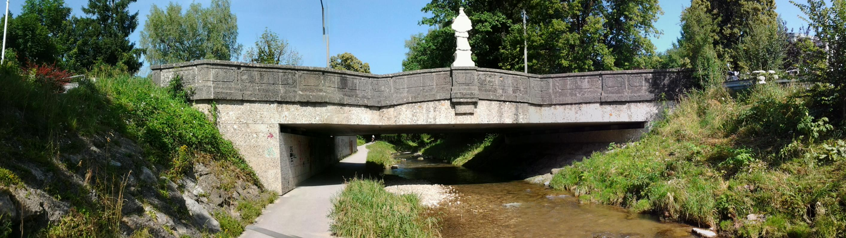 Der Alterbach und die Plainbrücke von der Westseite im Salzburger Stadtteil Itzling